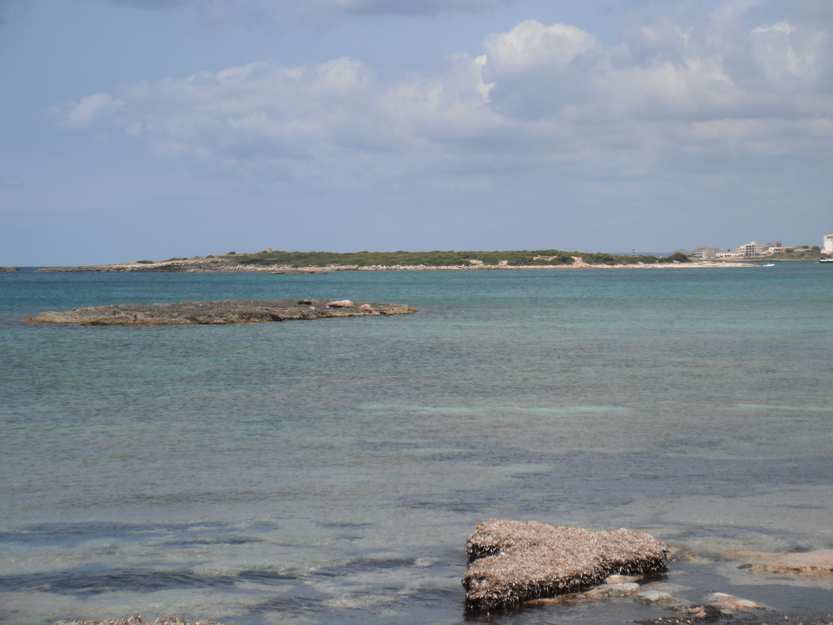 Na Moltotona, al fons, des des Carbó. En primer terme s'observa l'illot de ses Roquetes